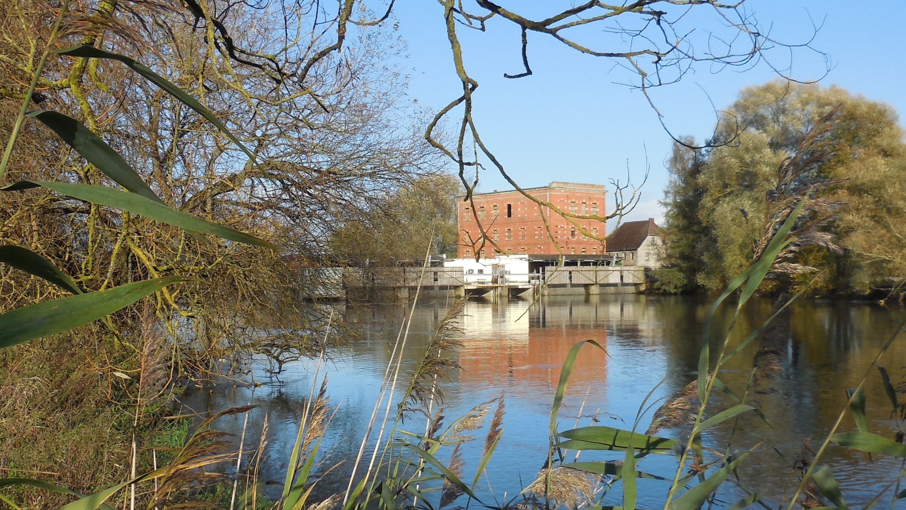 Baiersdorfermühle mit Wehr und Kraftwerk, vom Kleinseebacher-Ufer flussabwärts gesehen.